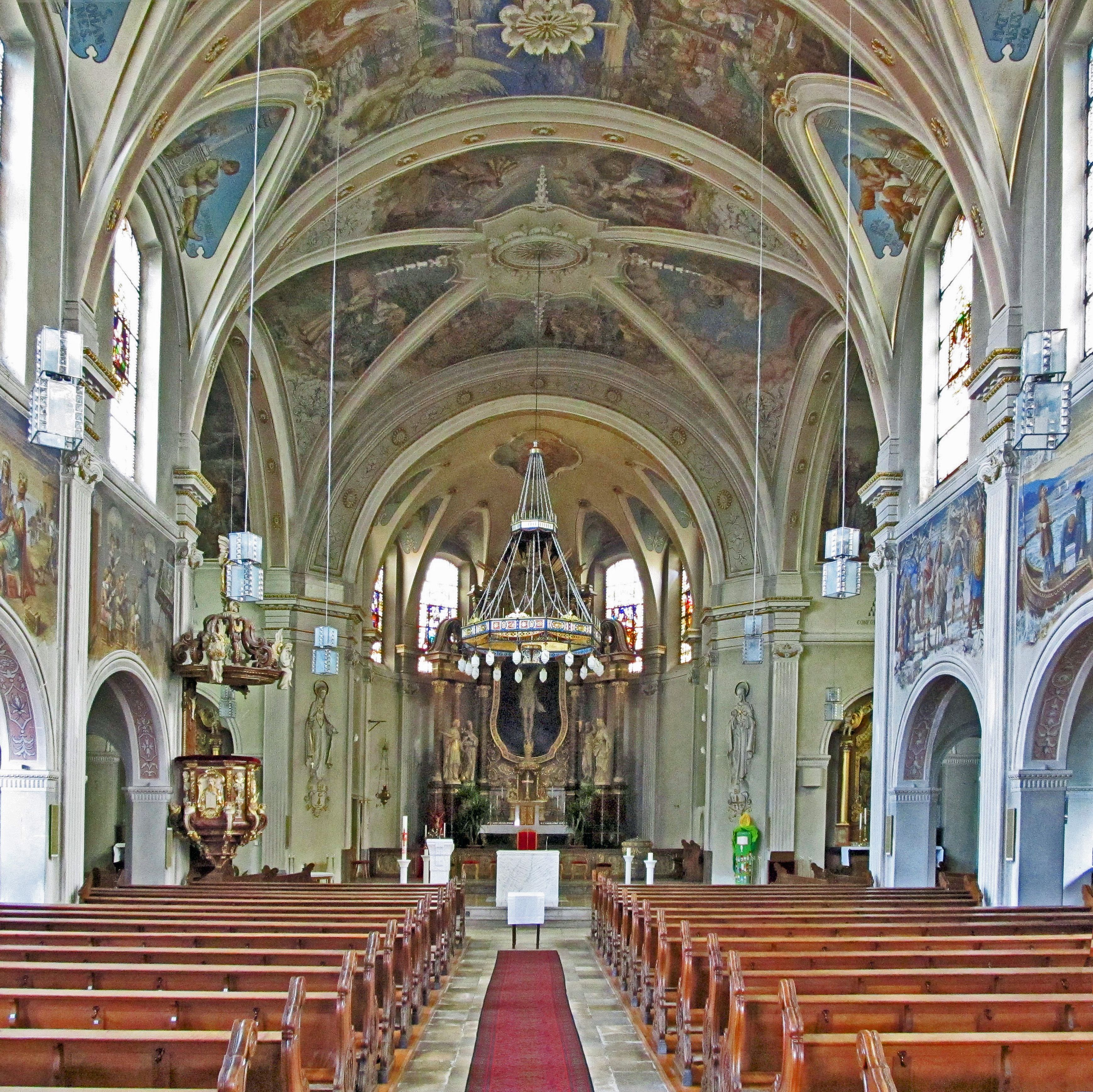 Blick ins Innere der katholischen Pfarrkirche Hl. Dreifaltigkeit in Wiebelskirchen, einem Stadtteil von Neunkirchen (Saar), Saarland